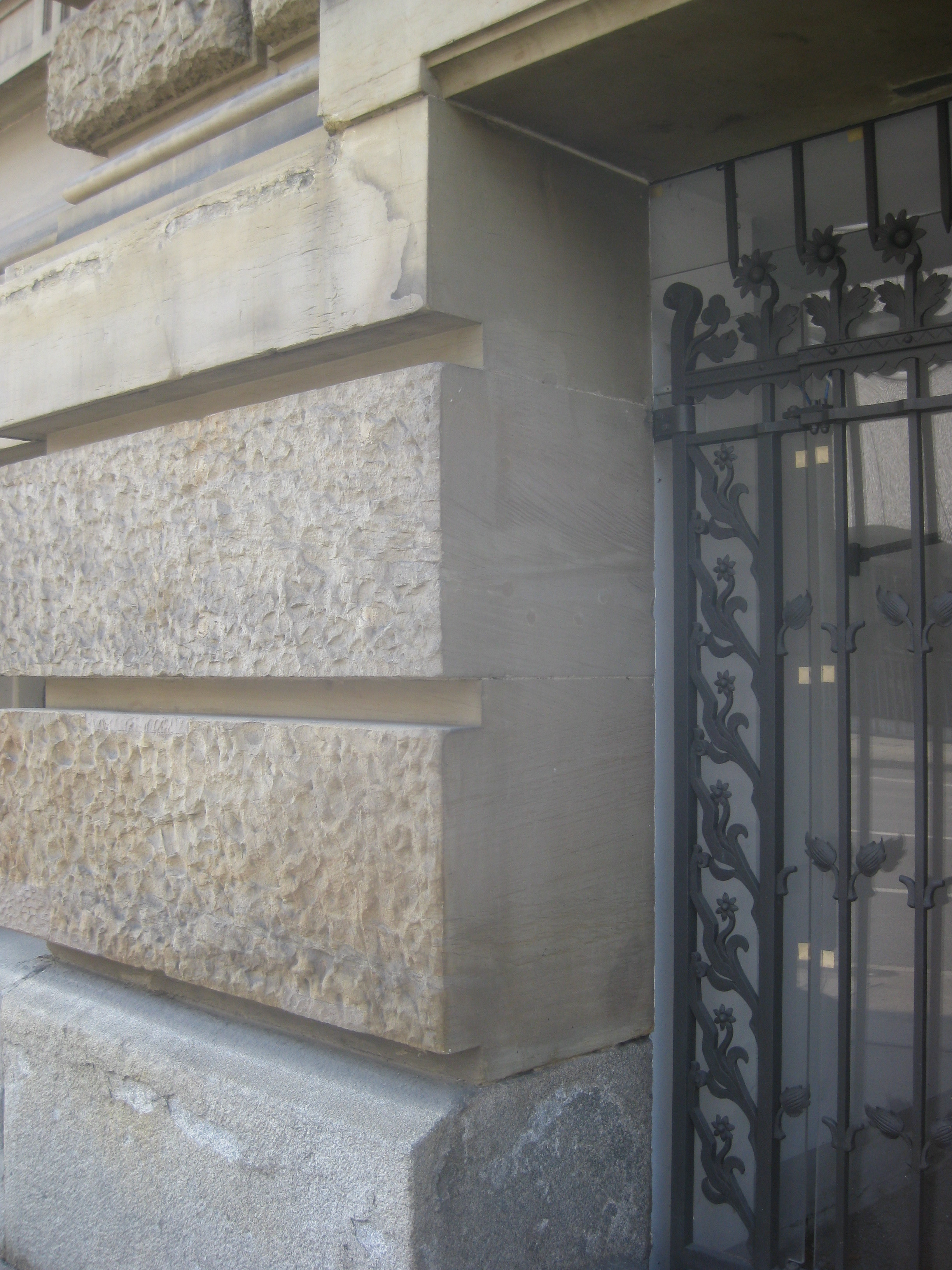 Bandrustika mit 0, 1 und 2 Randschlägen, Silberburgstraße 177 (Allianzgebäude).